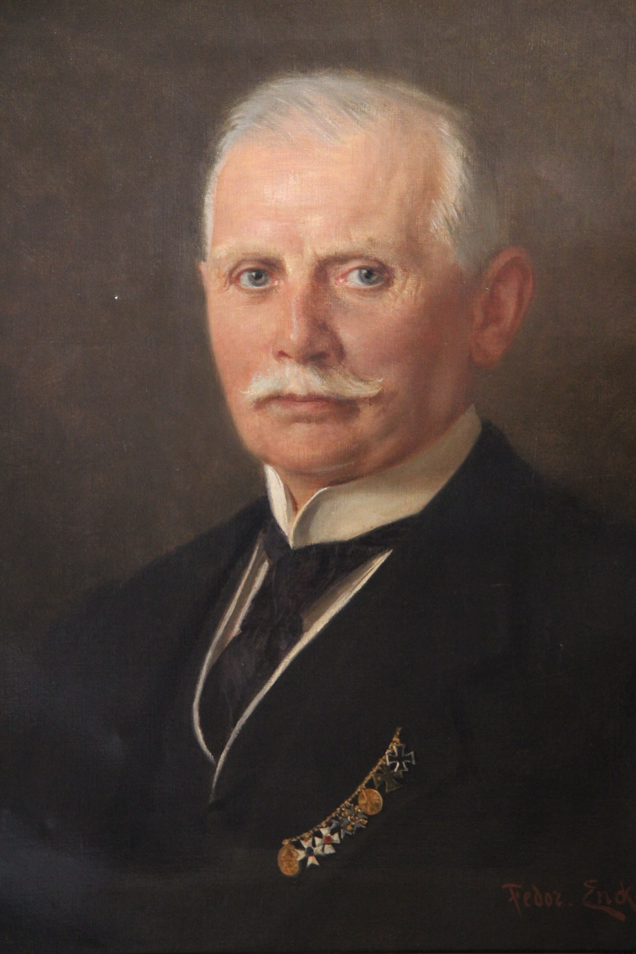 Ölgemälde Heinrich Beckurts von Fedor Encke, ca. 1925